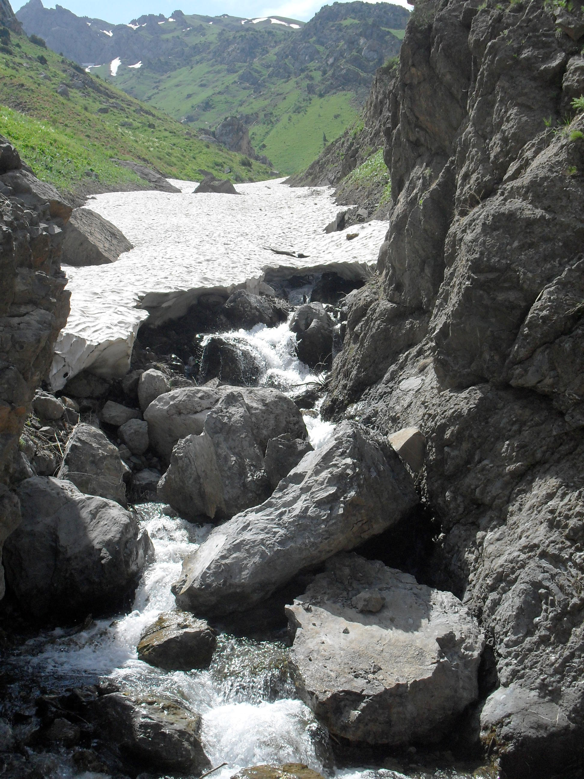 Долина реки Мазарсай. Бостанлыкский район, Ташкентская область, Республика Узбекистан.